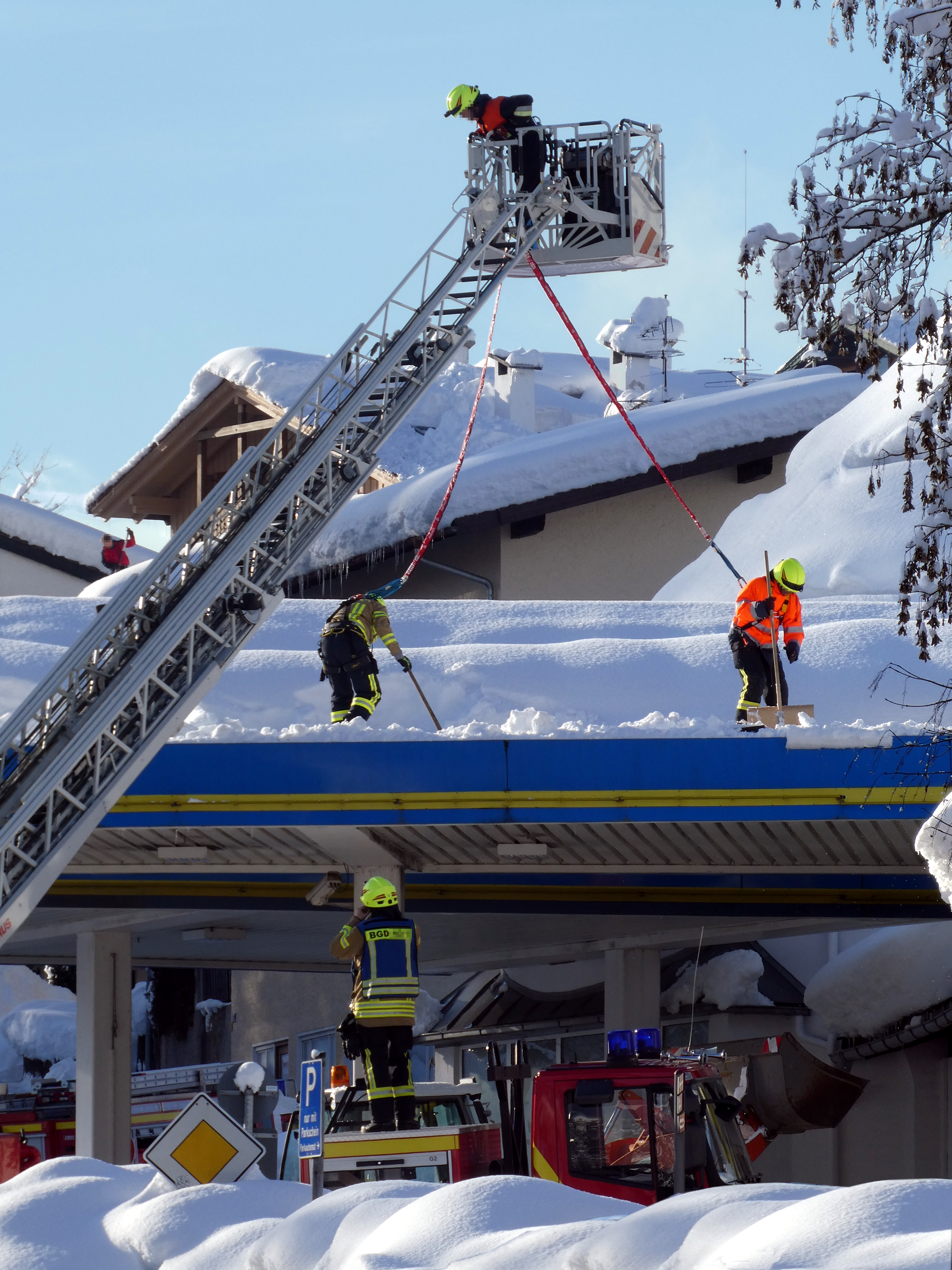 Berchtesgaden im Januar 2019 in einer Schneefallpause am 11. Januar, die Feuerwehr schaufelt die Schneelast von einem Tankstellendach.